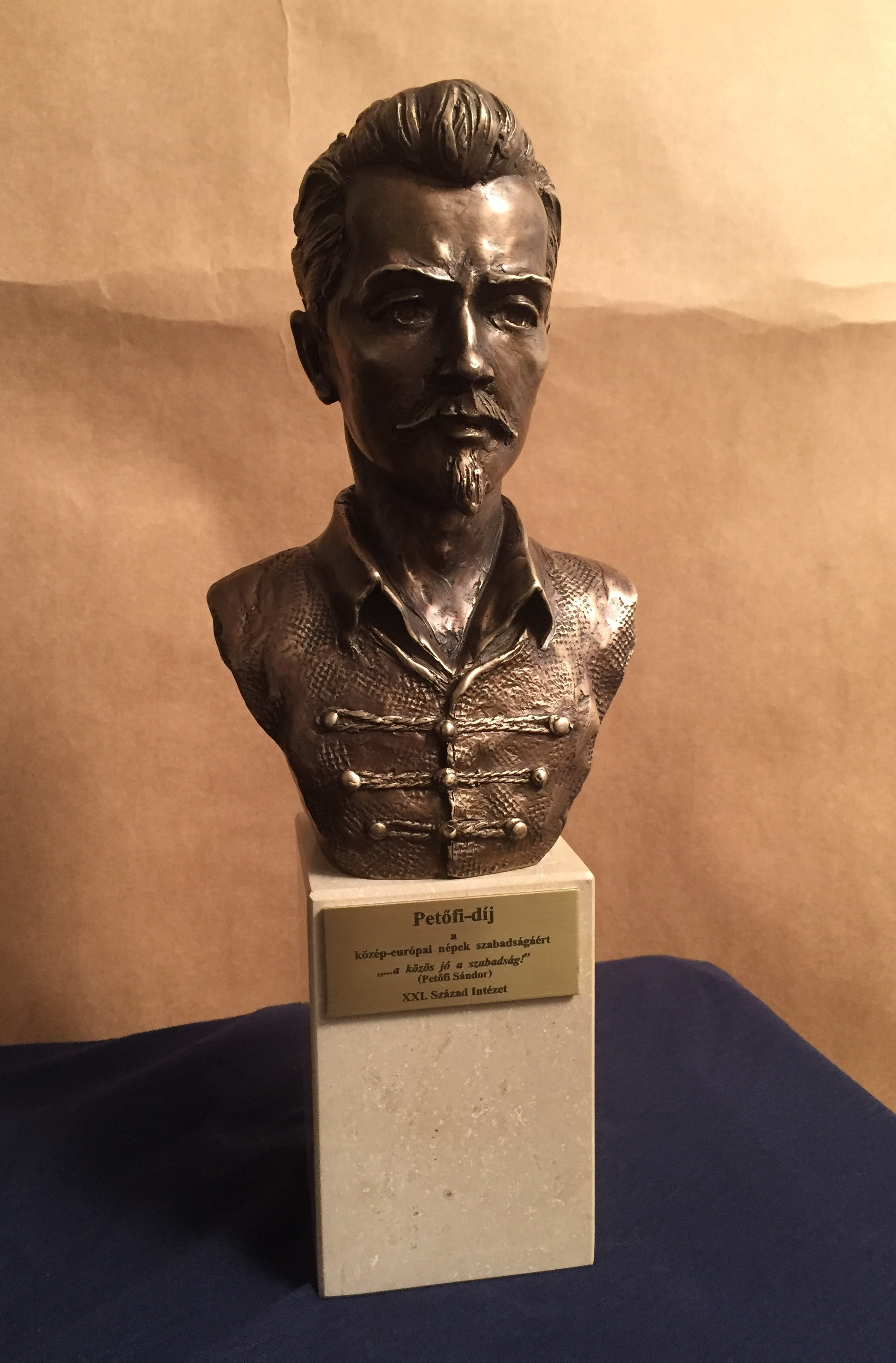 Petőfi Sándor bronz mellszobra (Petőfi-díj)